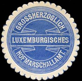 Sealing stamp Title: Grossherzoglich Luxemburgisches Hofmarschallamt Description: blau, weiß, geprägt Place: Luxemburg size: 4 cm